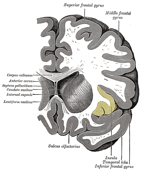 Insular cortex.